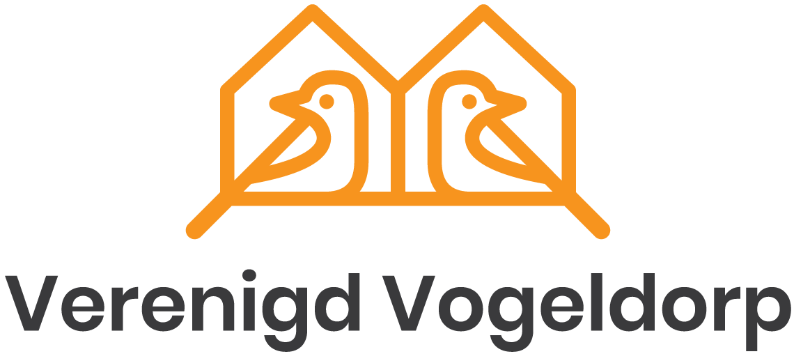 Logo Verenigd Vogeldorp